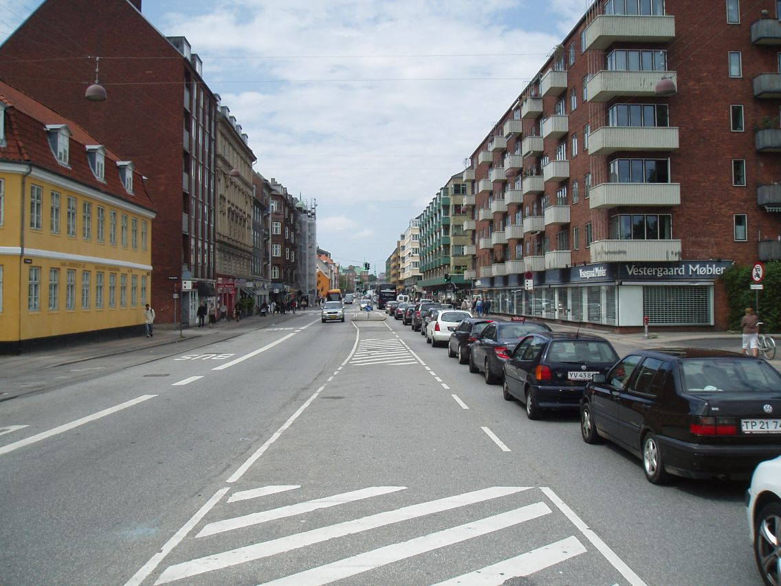 Torvegade på Christianshavn